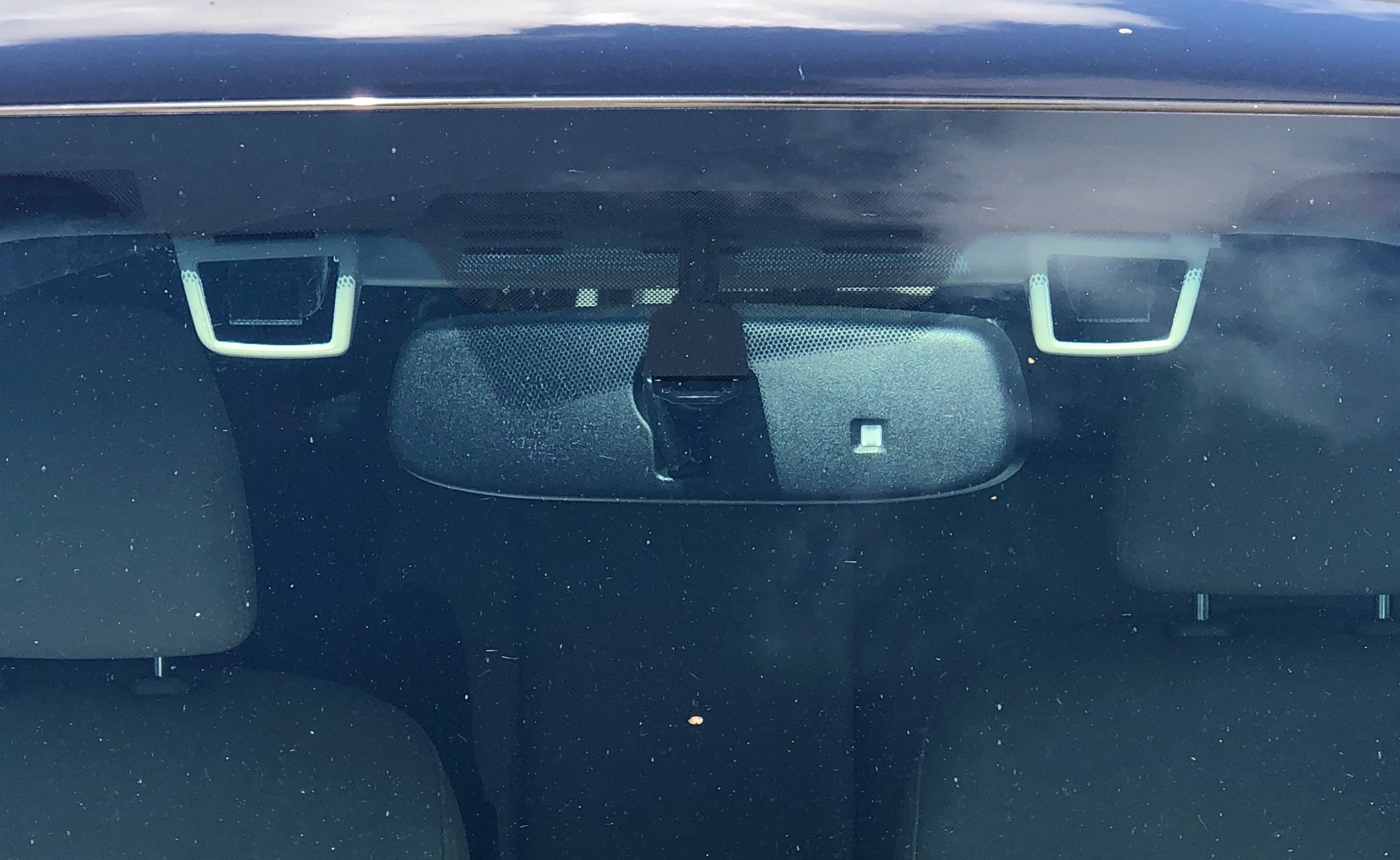 Radar i forrude på en Subaru